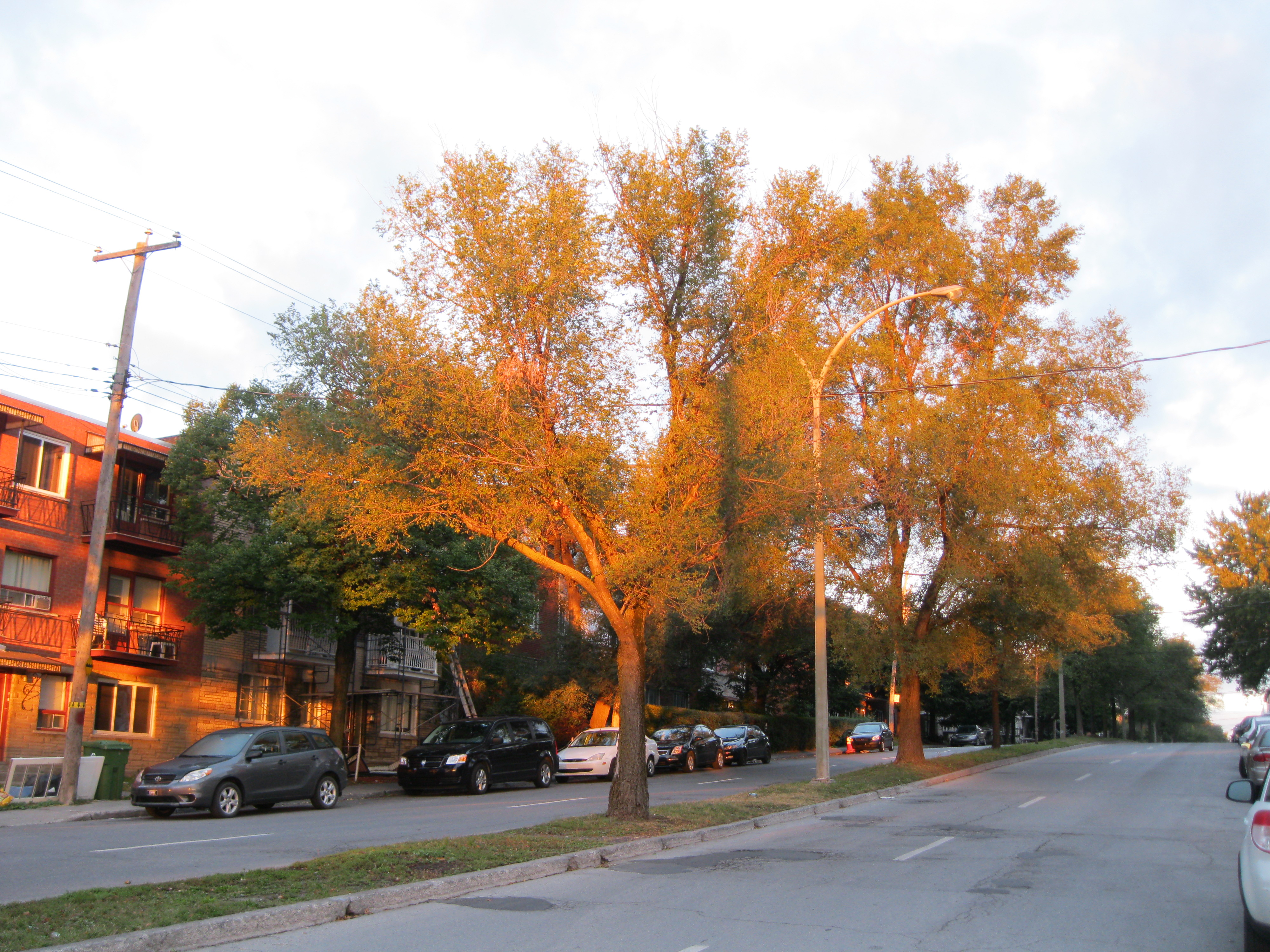 Montréal à l'aurore, le boulevard Langelier, juste au nord de la rue Hochelaga